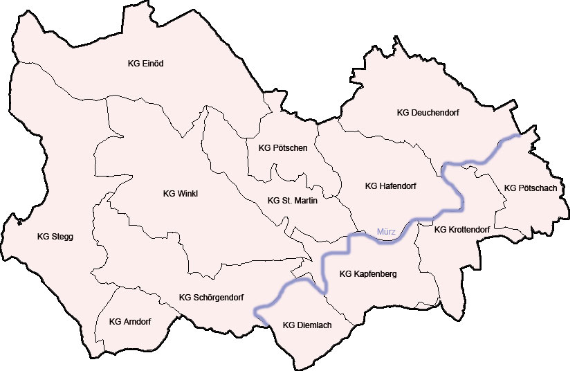 Karte mit den dreizehn Katastralgemeinden von Kapfenberg und dem ungefähren Verlauf der Mürz, Stand vor der Steiermärkischen Gemeindestrukturreform 2015, ungültig ab 1.1.2015